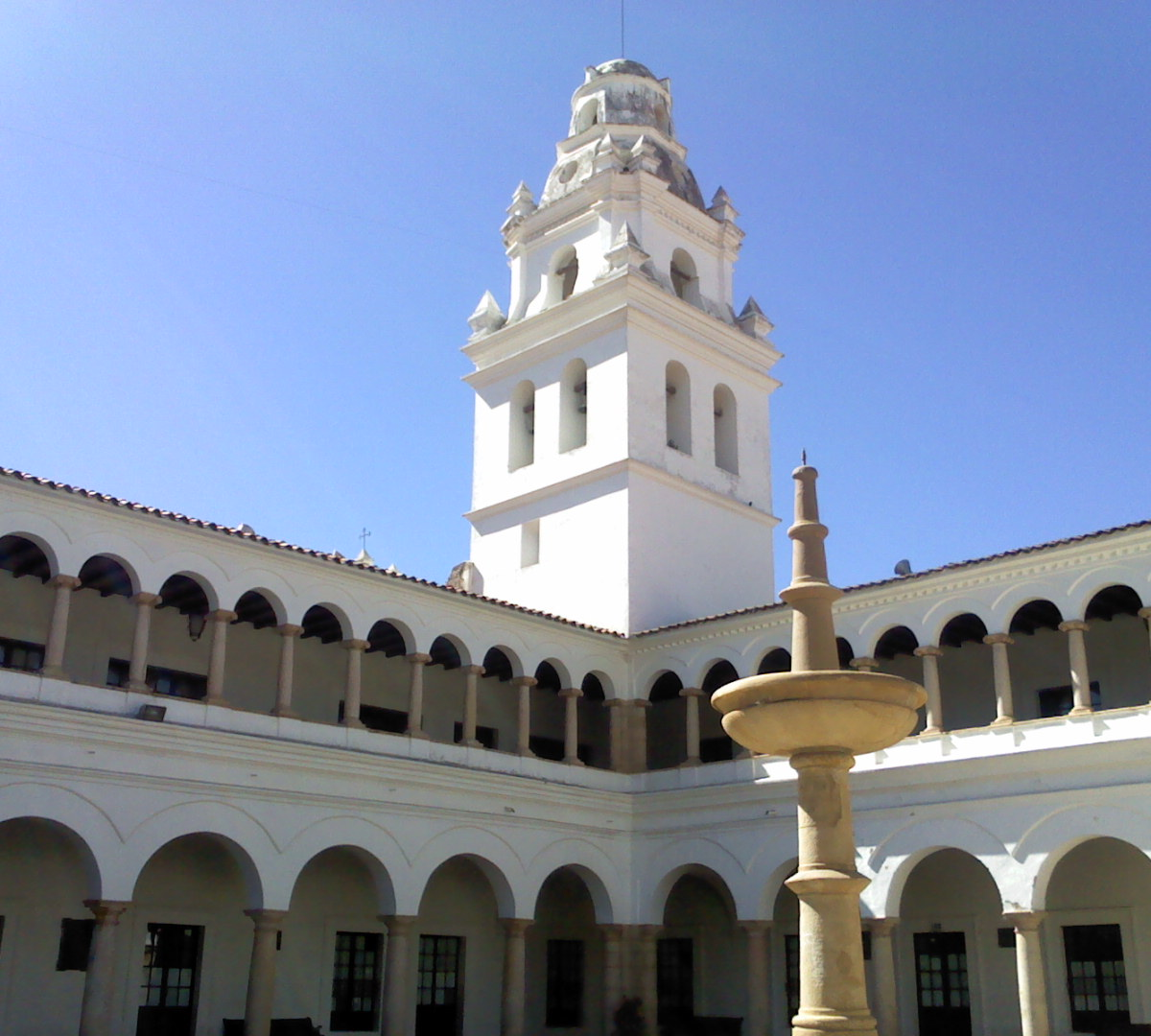 Edificio histórico de la Universidad This medium shows the protected monument with the number H/00-111 in Bolivia.